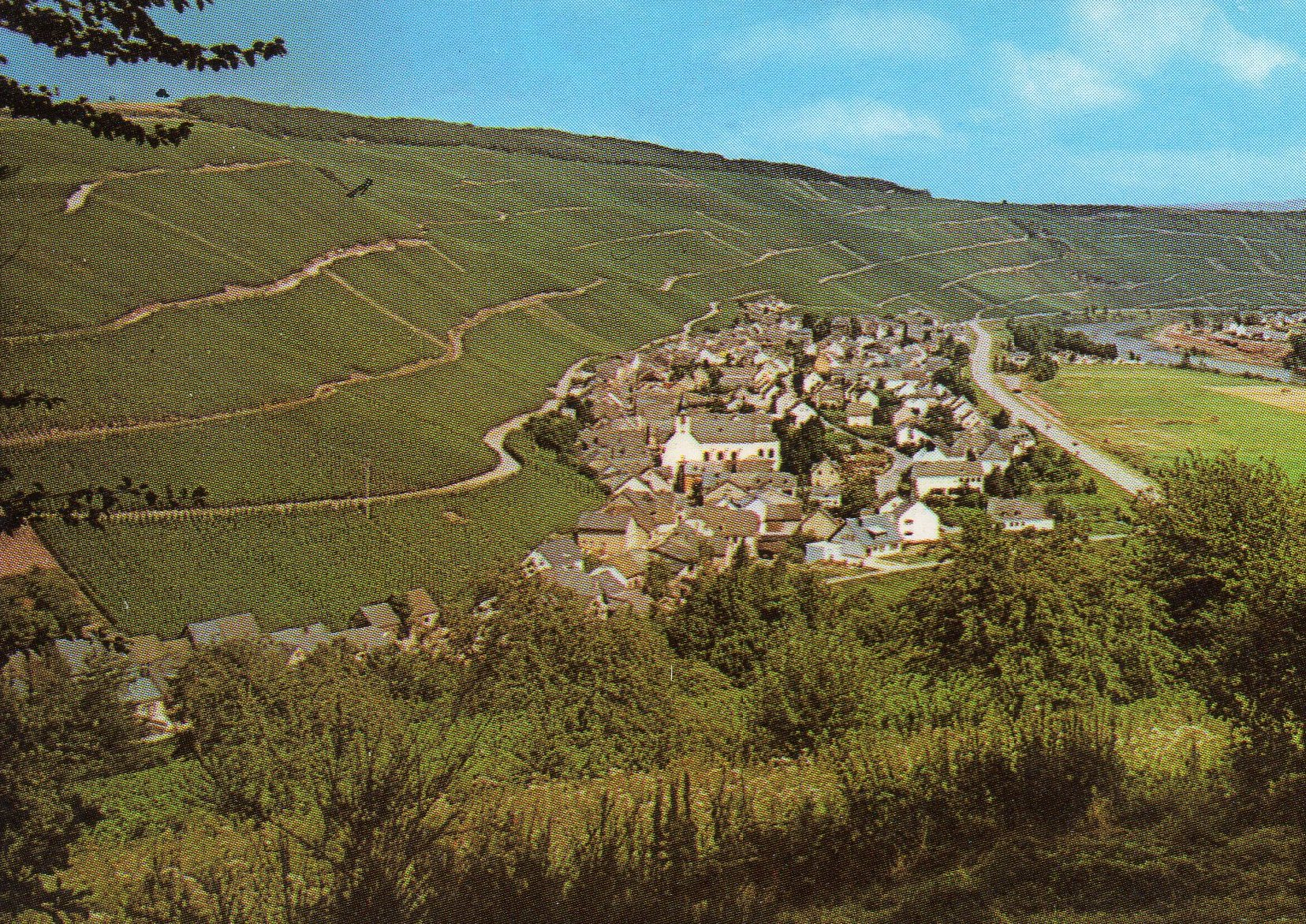 Klüsserath auf einer Ansichtskarte von 1976, vom Osthang (rechtes Salmufer) des Rudembergs aus gesehen